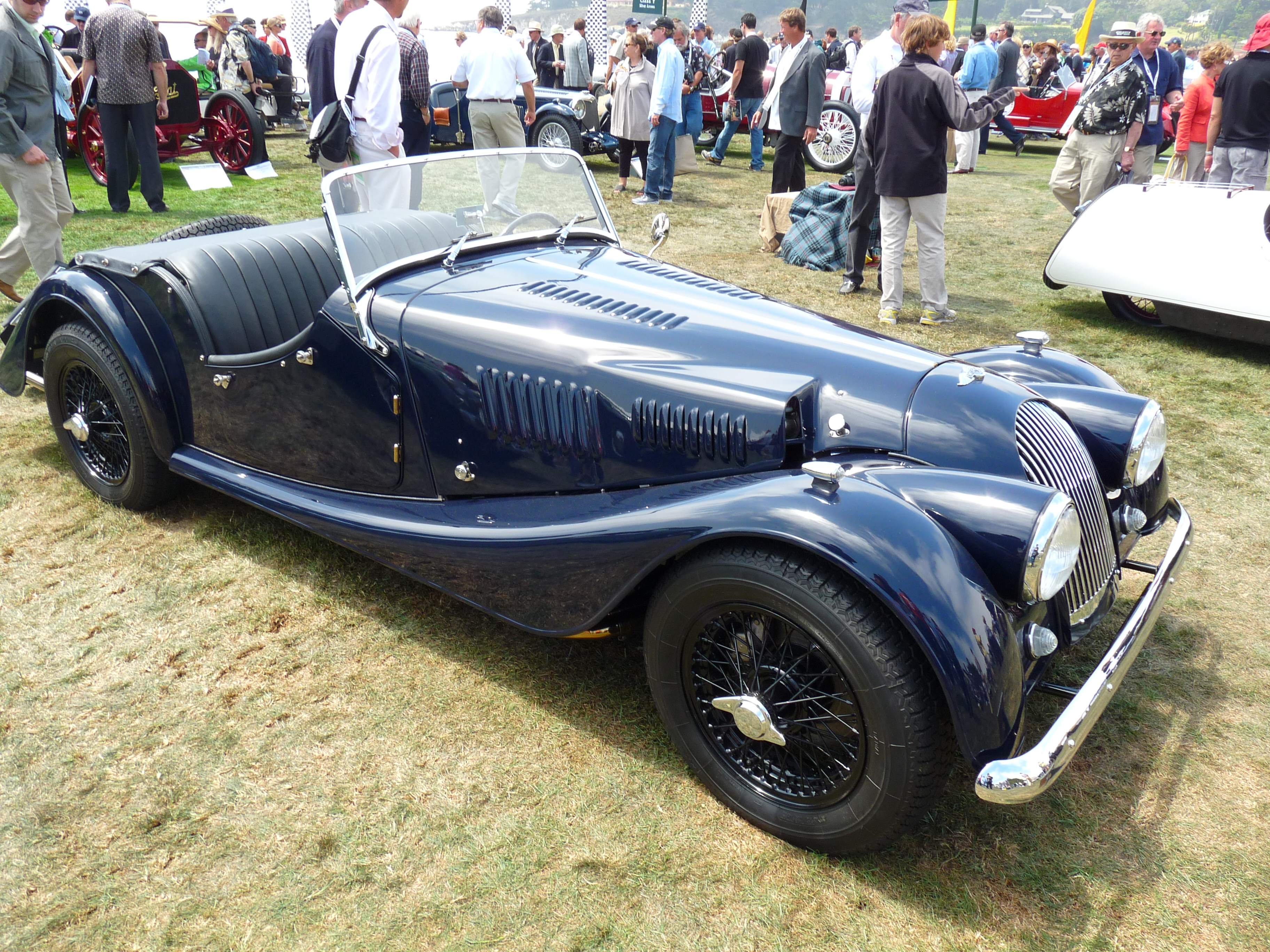 1963 Morgan +4